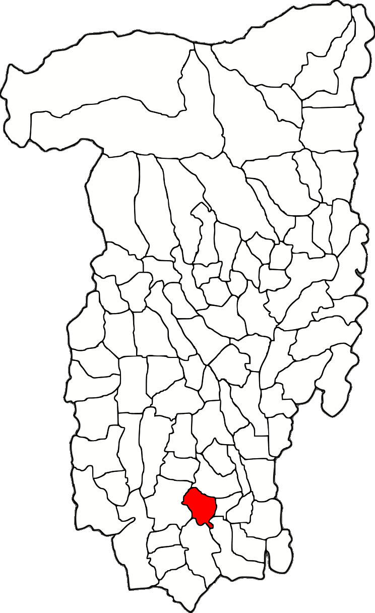 Lage der Gemeinde Mădulari im Kreis Vâlcea (RO).